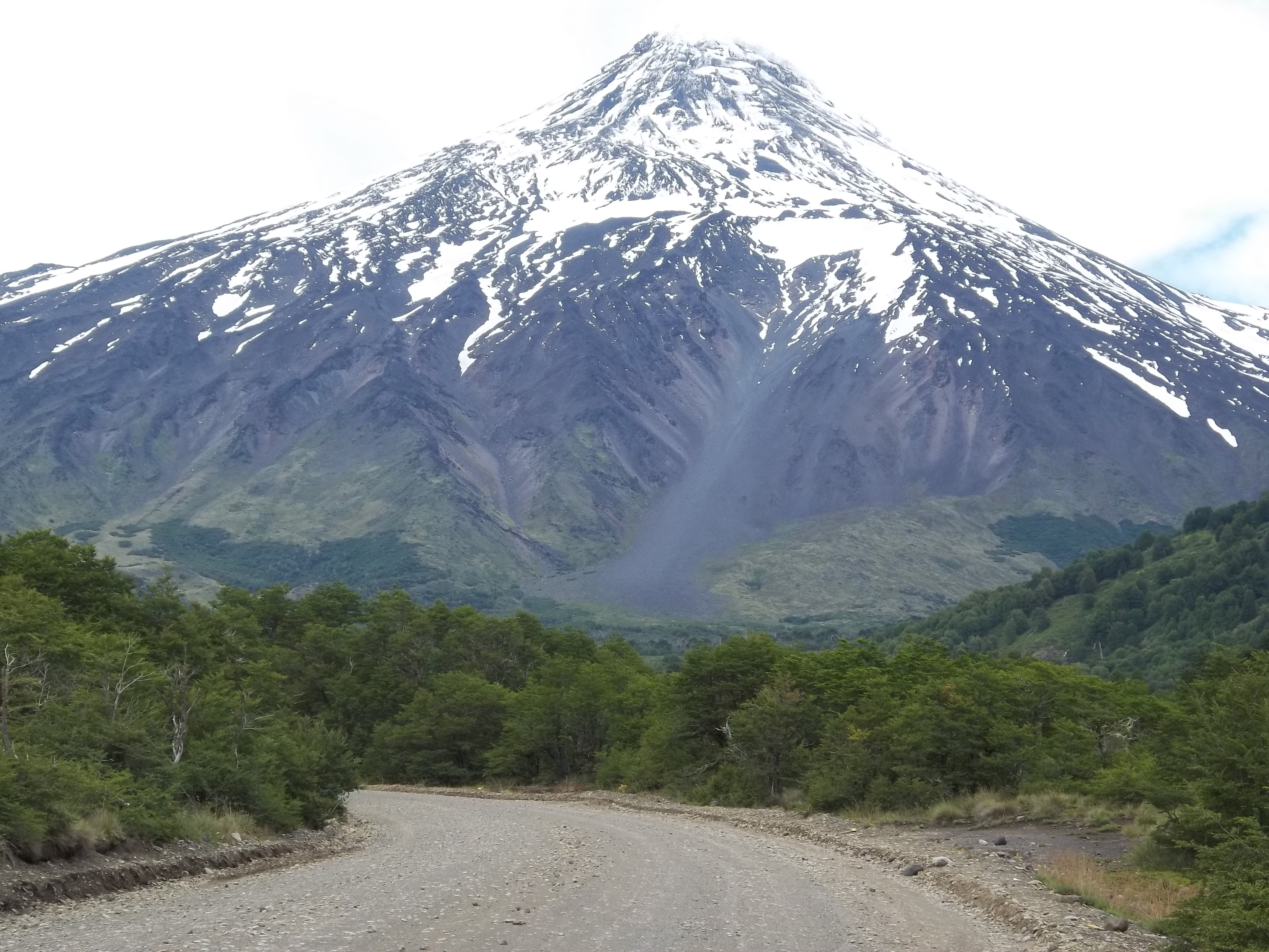 Volcán Lanín desde la Ruta CH-199 cerca del paso internacional Mamuil Malal en la región de la Araucanía, Chile.